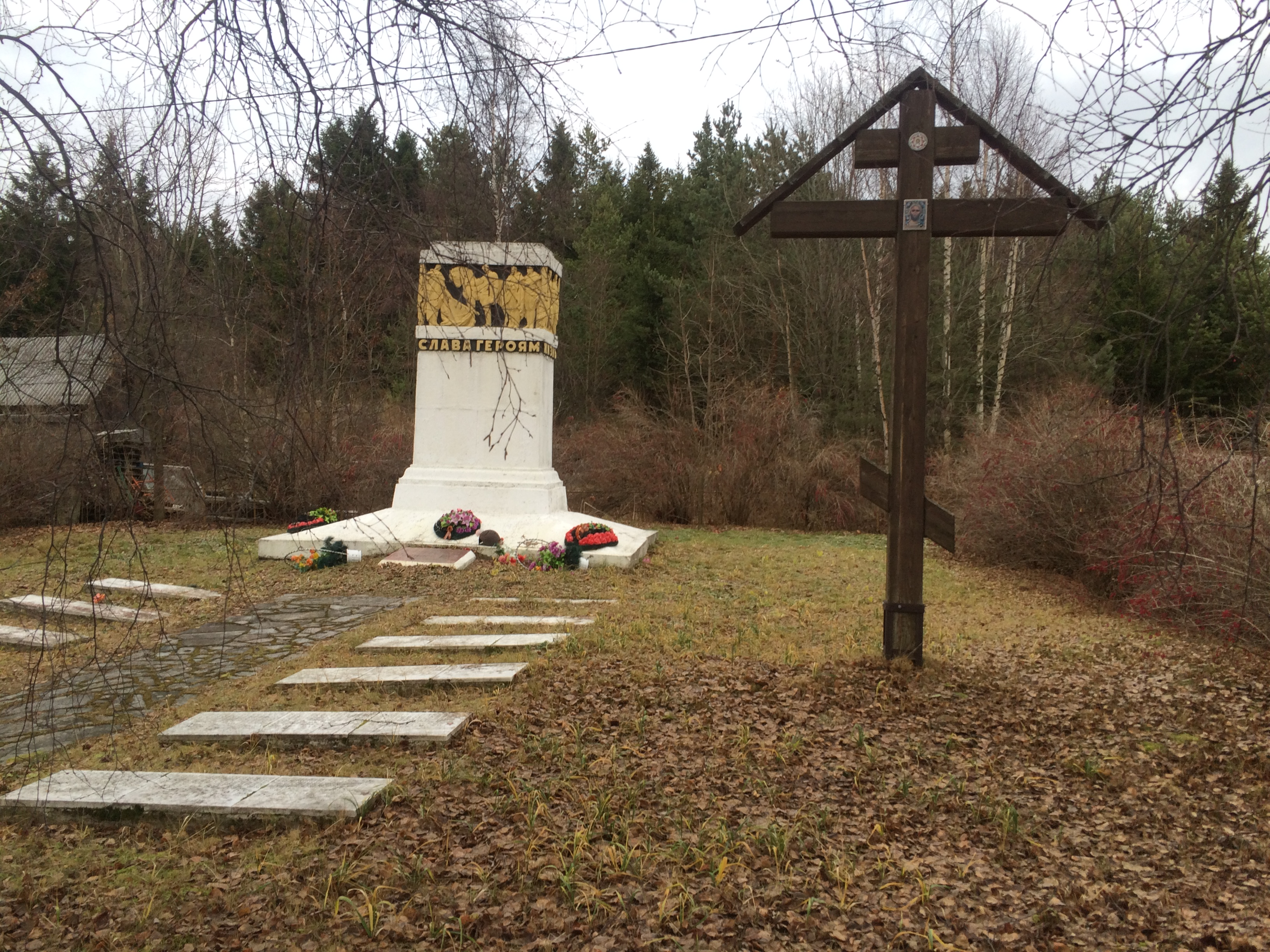 Питкяранта, памятник "Слава Героям"